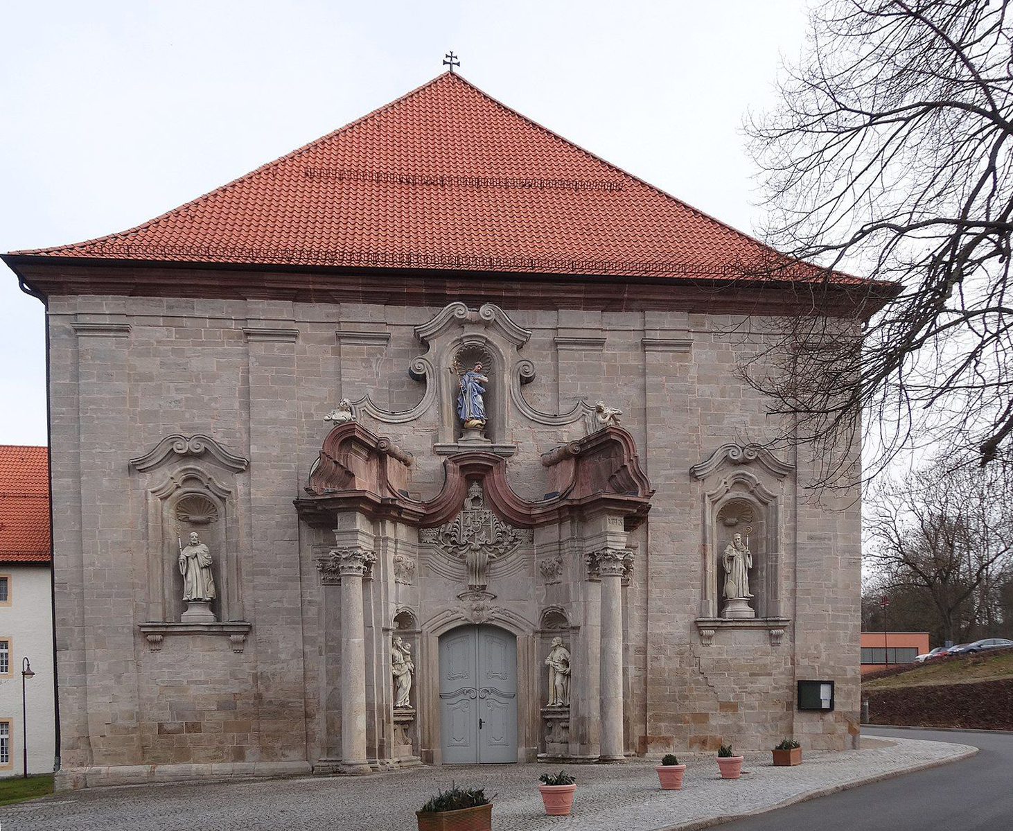 Kirche in Reifenstein, Thüringen